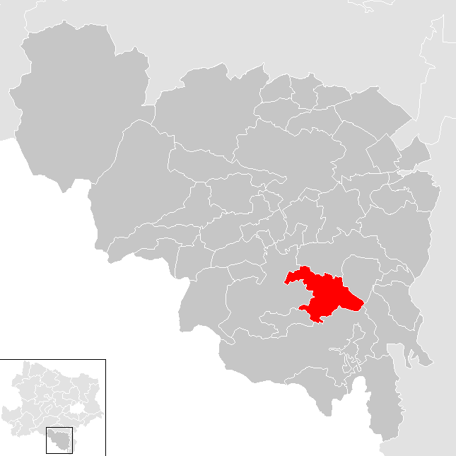 Bezirk Neunkirchen